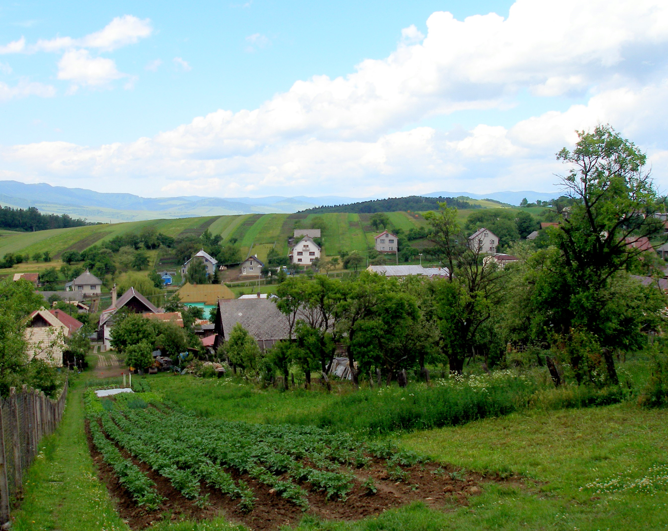 Obec Červená Voda okres Sabinov